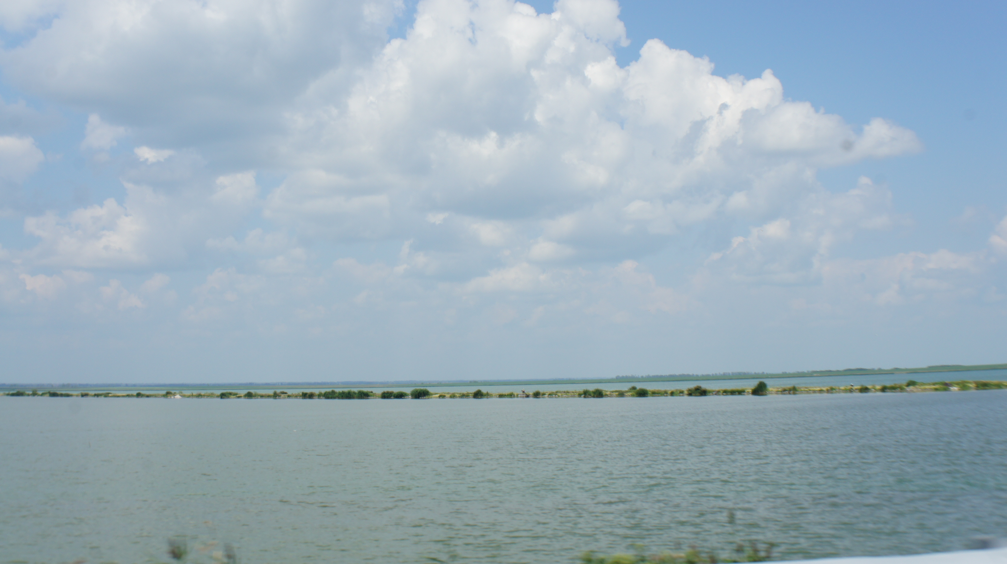 озеро Горькое (Рубцовский район)